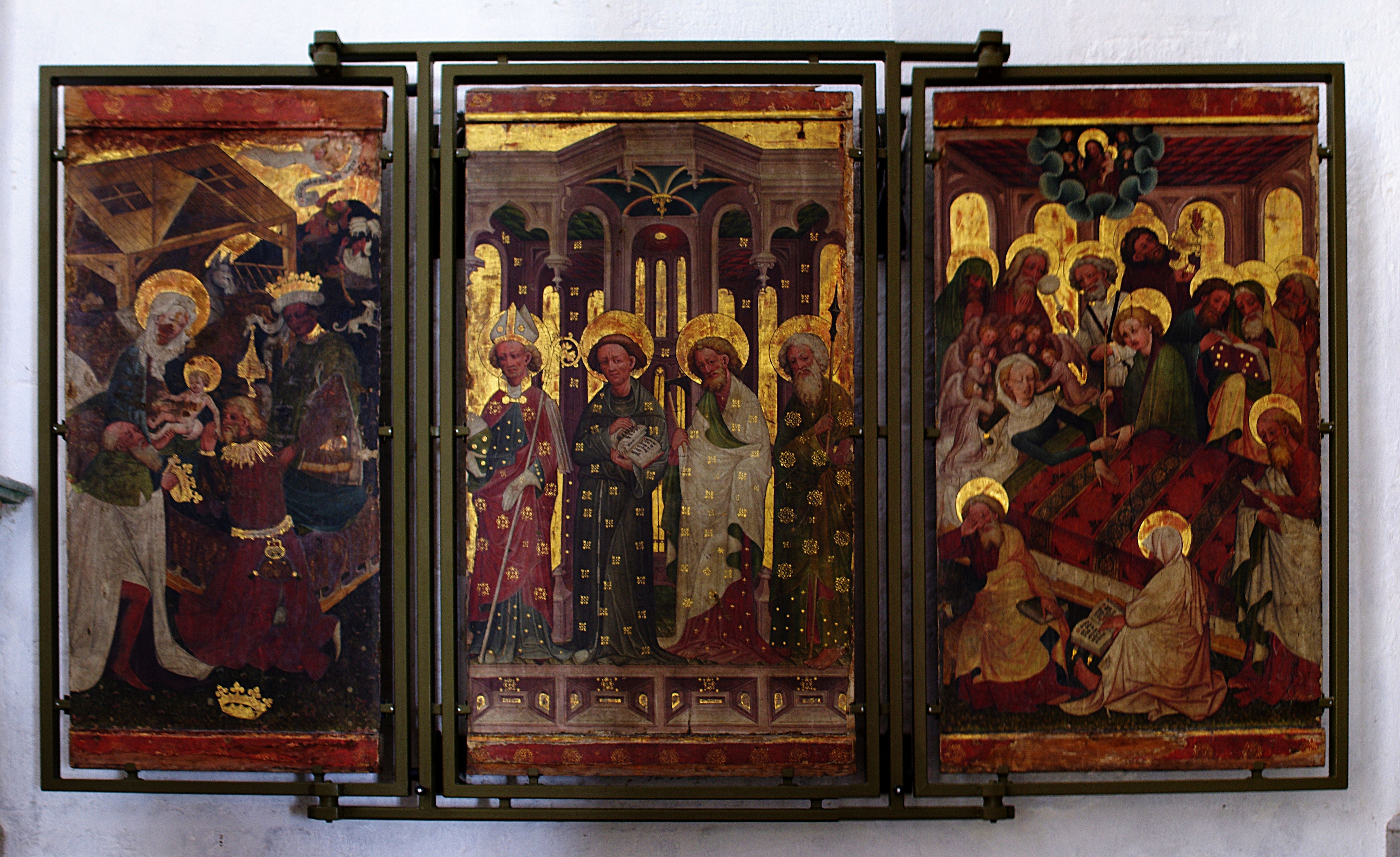 Arnstadt in Thüringen. Bilder eines Flügelaltars in der Liebfrauenkriche